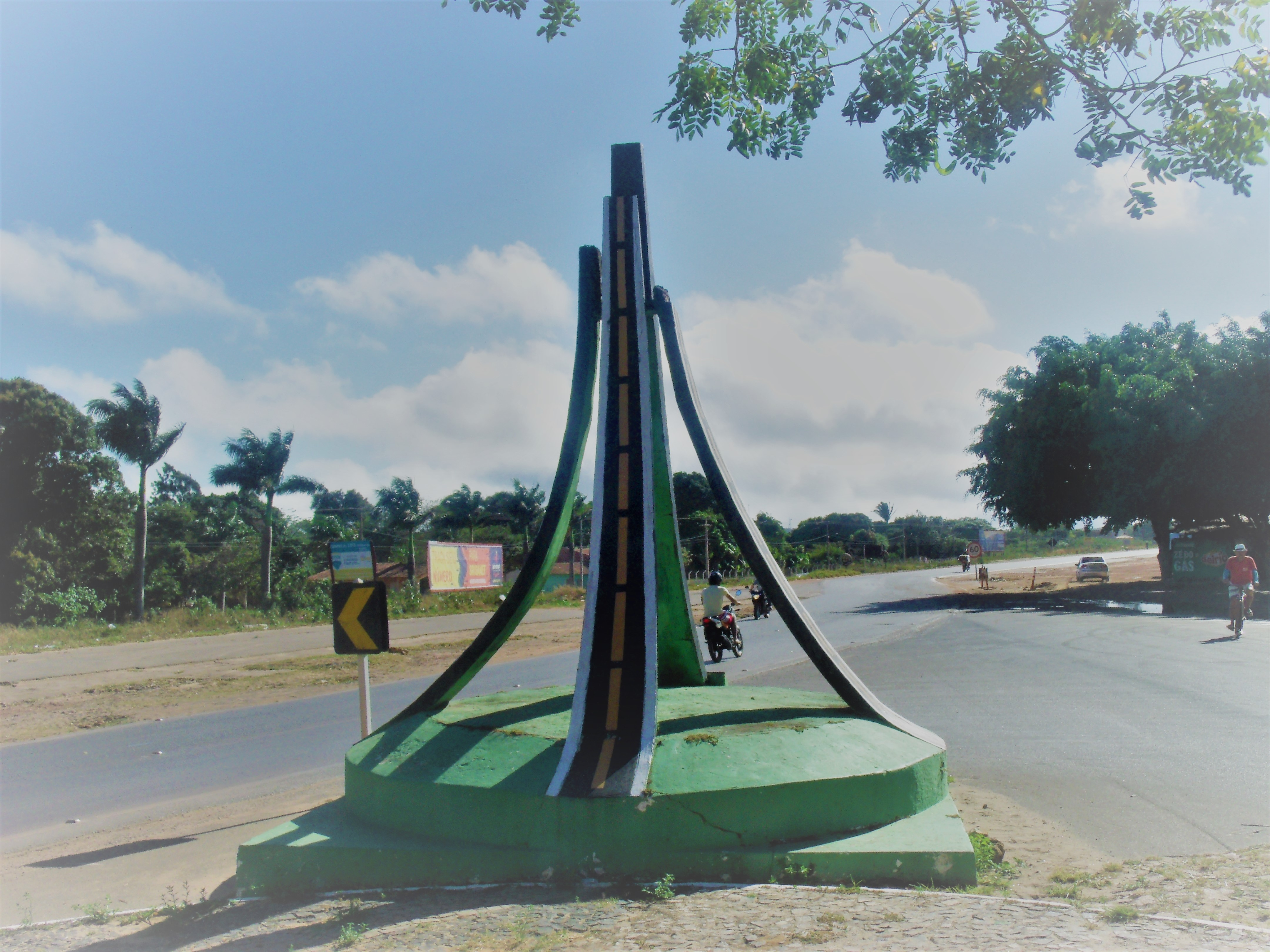 Monumento do DERT em Tianguá.